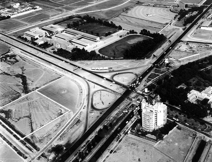 Vista aérea del edificio limatambo a inicios de la década de 1960's.